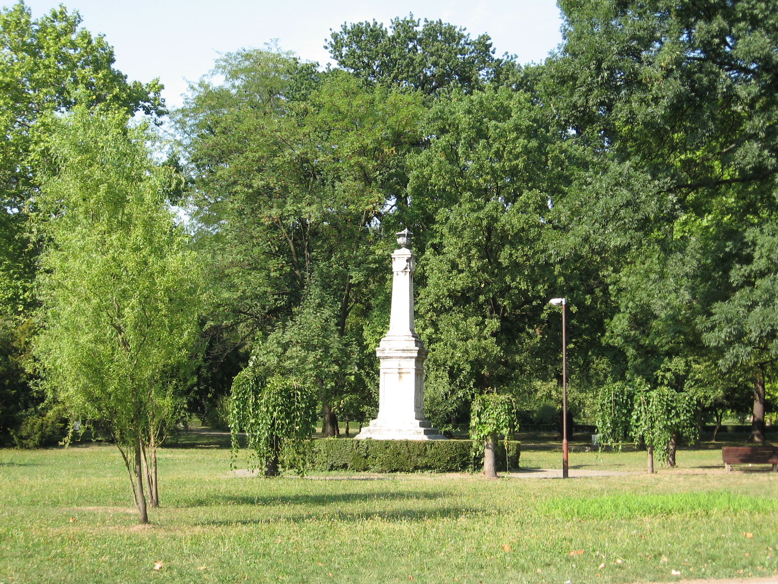 Park Topčider